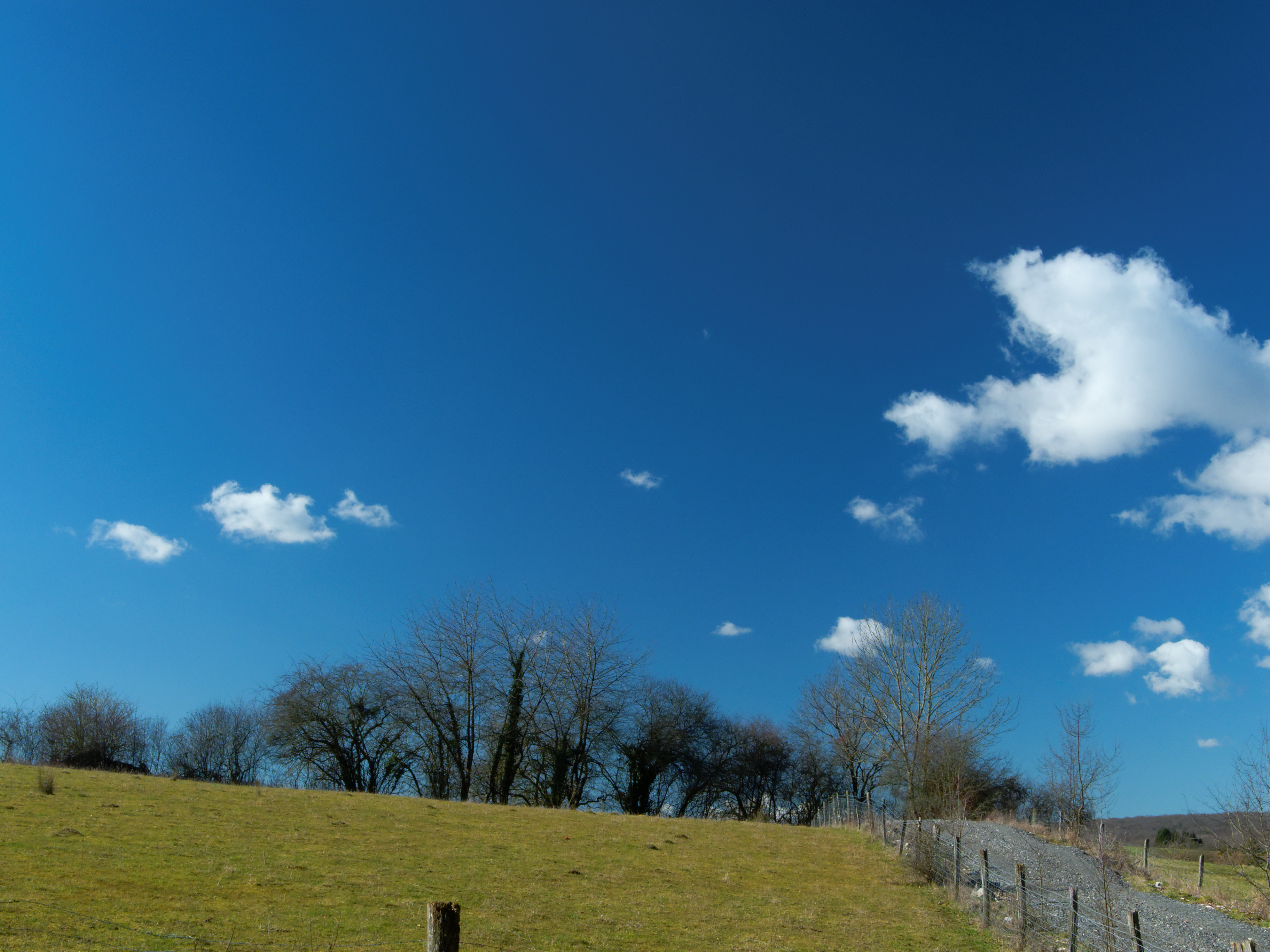 Paysage à Champey. Photo réalisée avec un filtre polarisant.